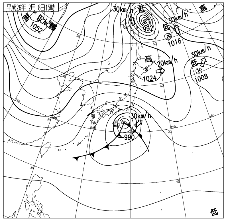 2014年2月8日15時の日本付近の天気図。